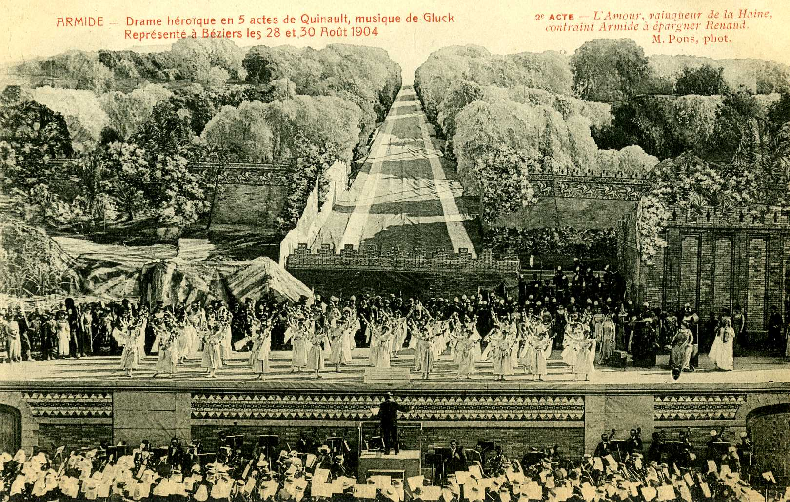 Carte postale éditée en 1904 lors de la représentation de l'opéra Armide de Gluck au Théâtre des Arènes, à Béziers.